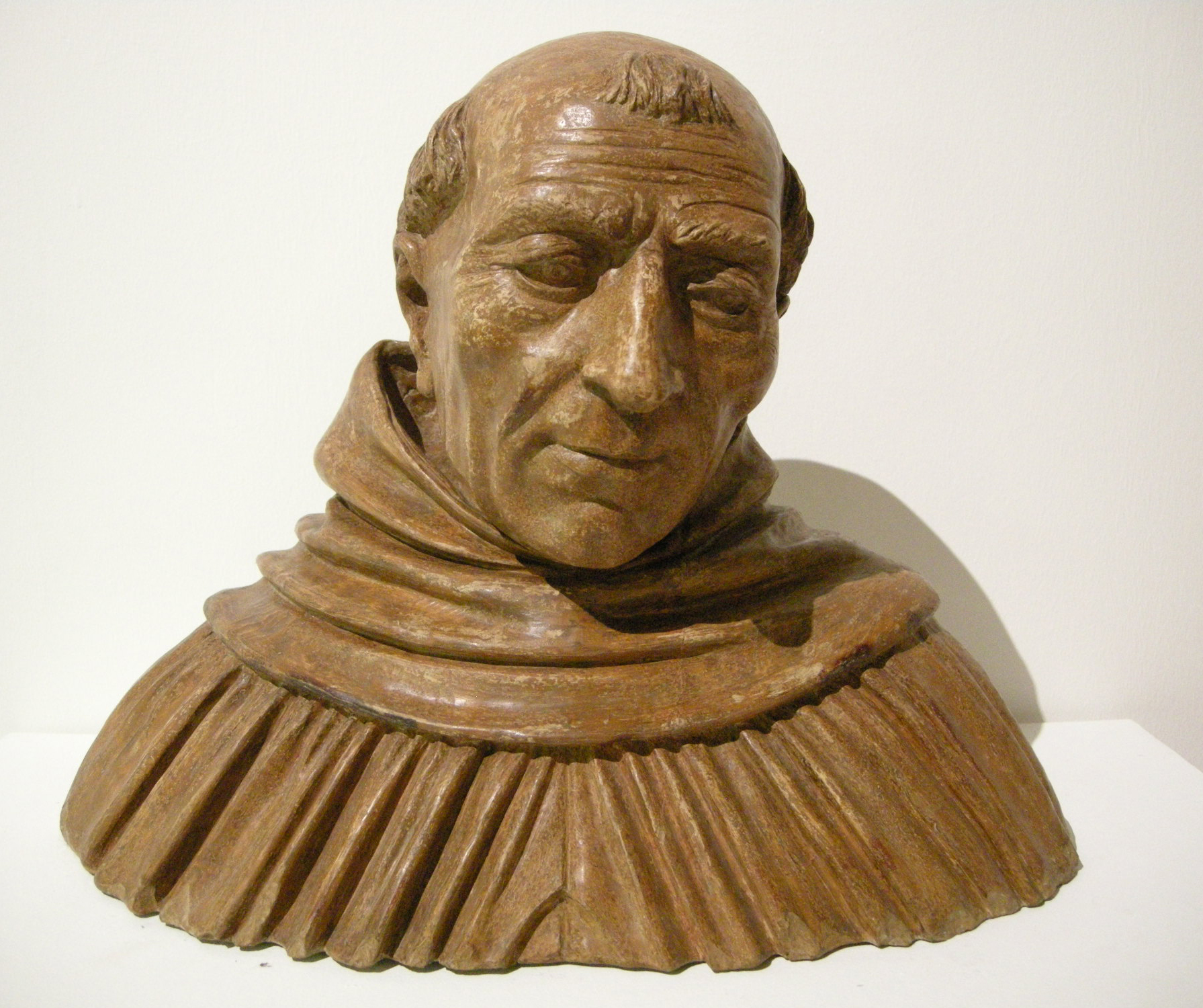 Vincenzo Onofri, Sant'Alberto Magno (1493), esposto nel Museo civico medievale a Bologna.